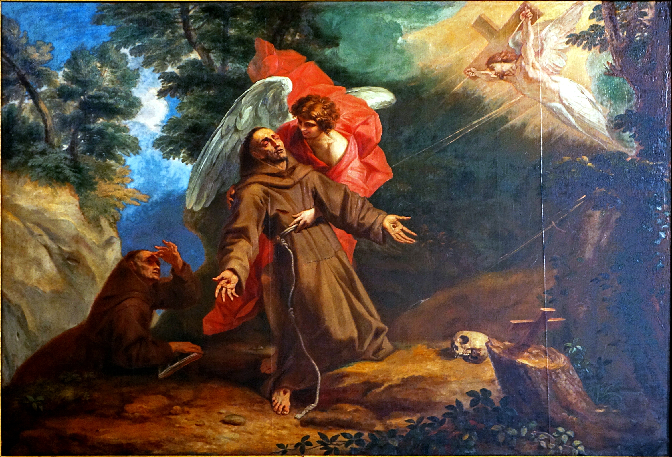 Saint François d'Assise recevant les stigmates par Arnould de Vuez dans la chapelle de l'Hospice Comtesse à Lille (Nord).